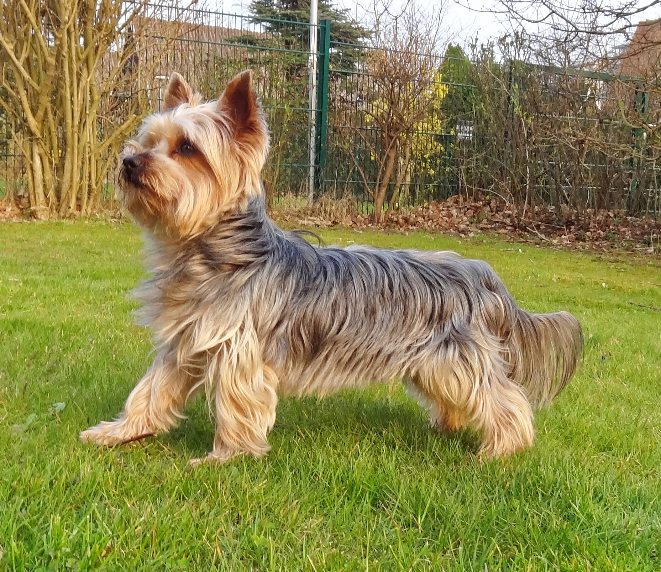 Yorkshire Terrier Rüde